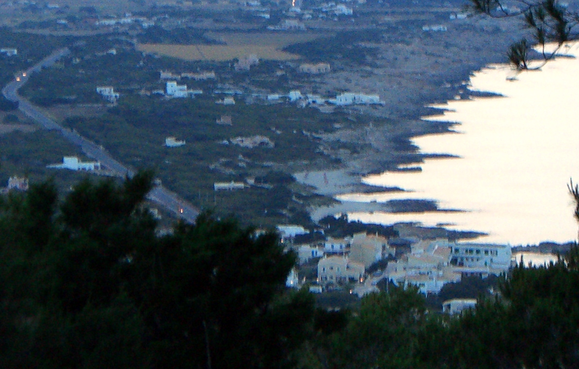 Ses Platgetes i es Caló vistos des de la Mola